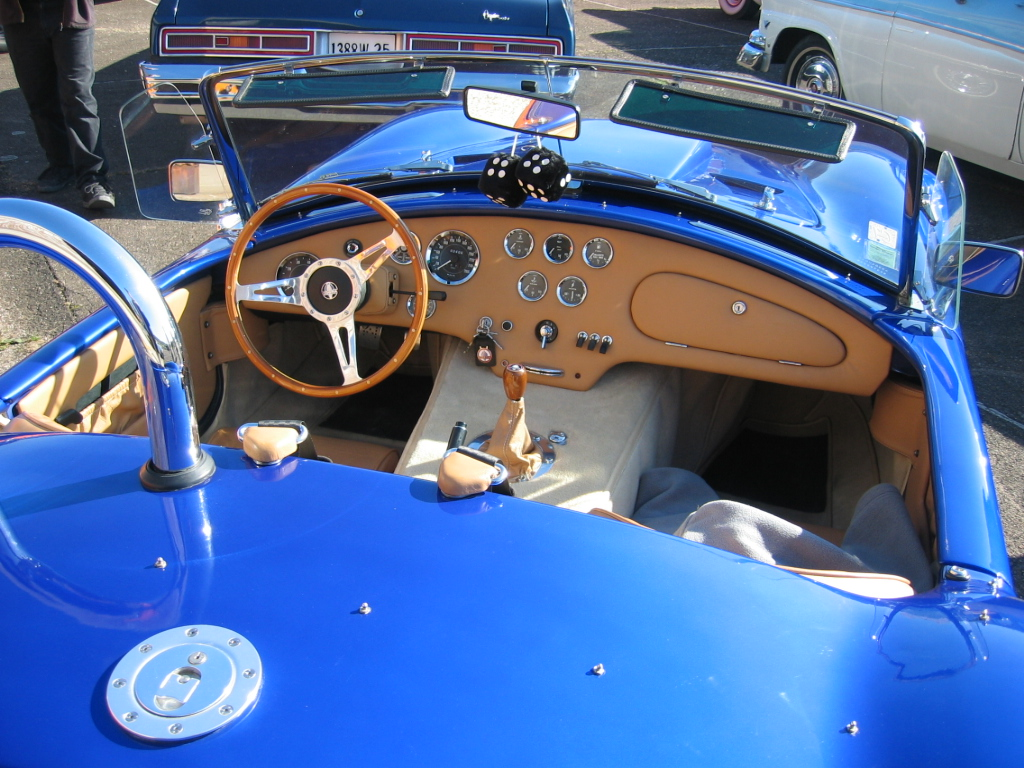 AC COBRA